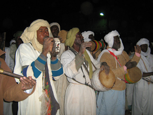 مزمار